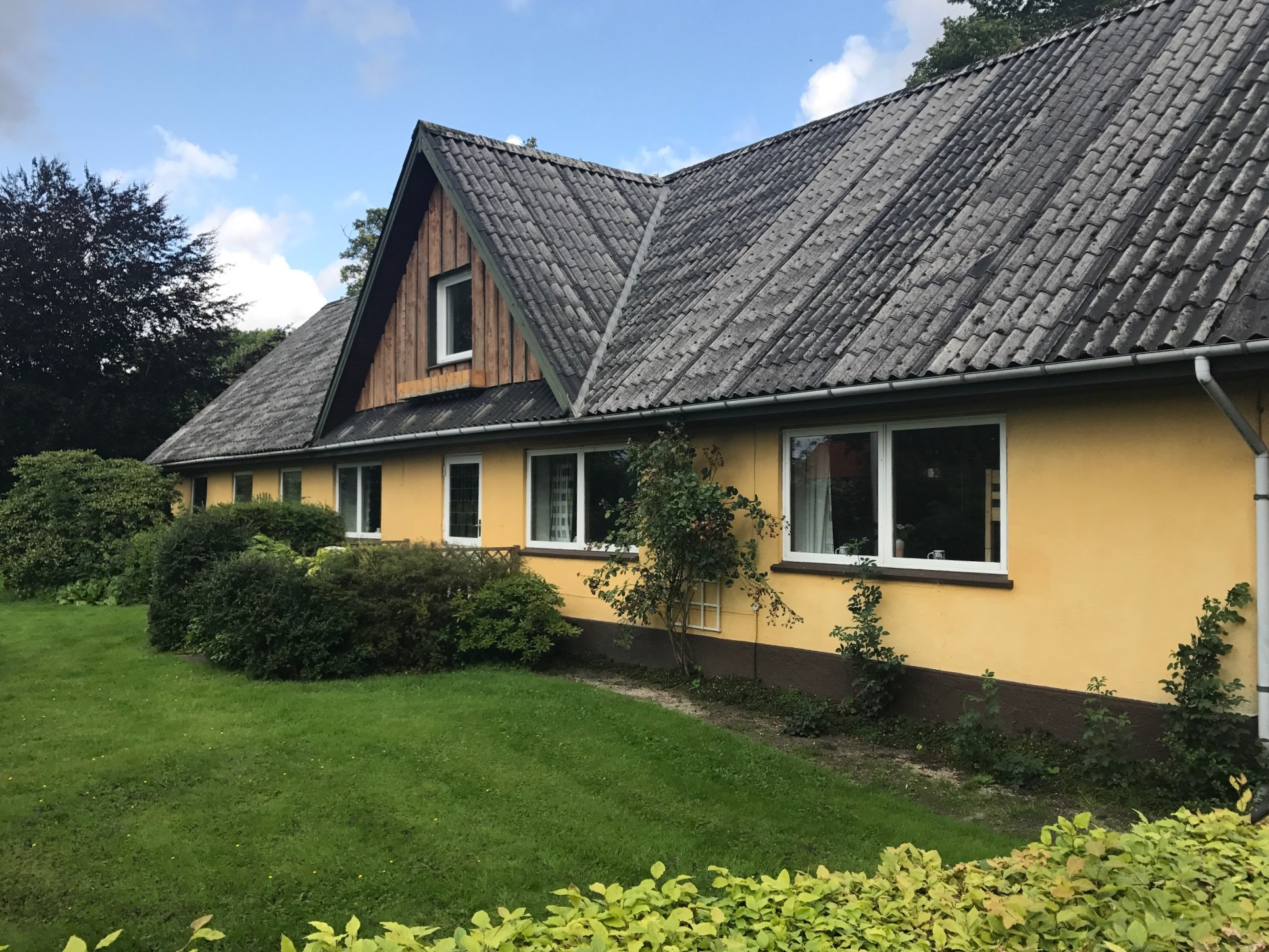 Haervejen Herberj Thorning